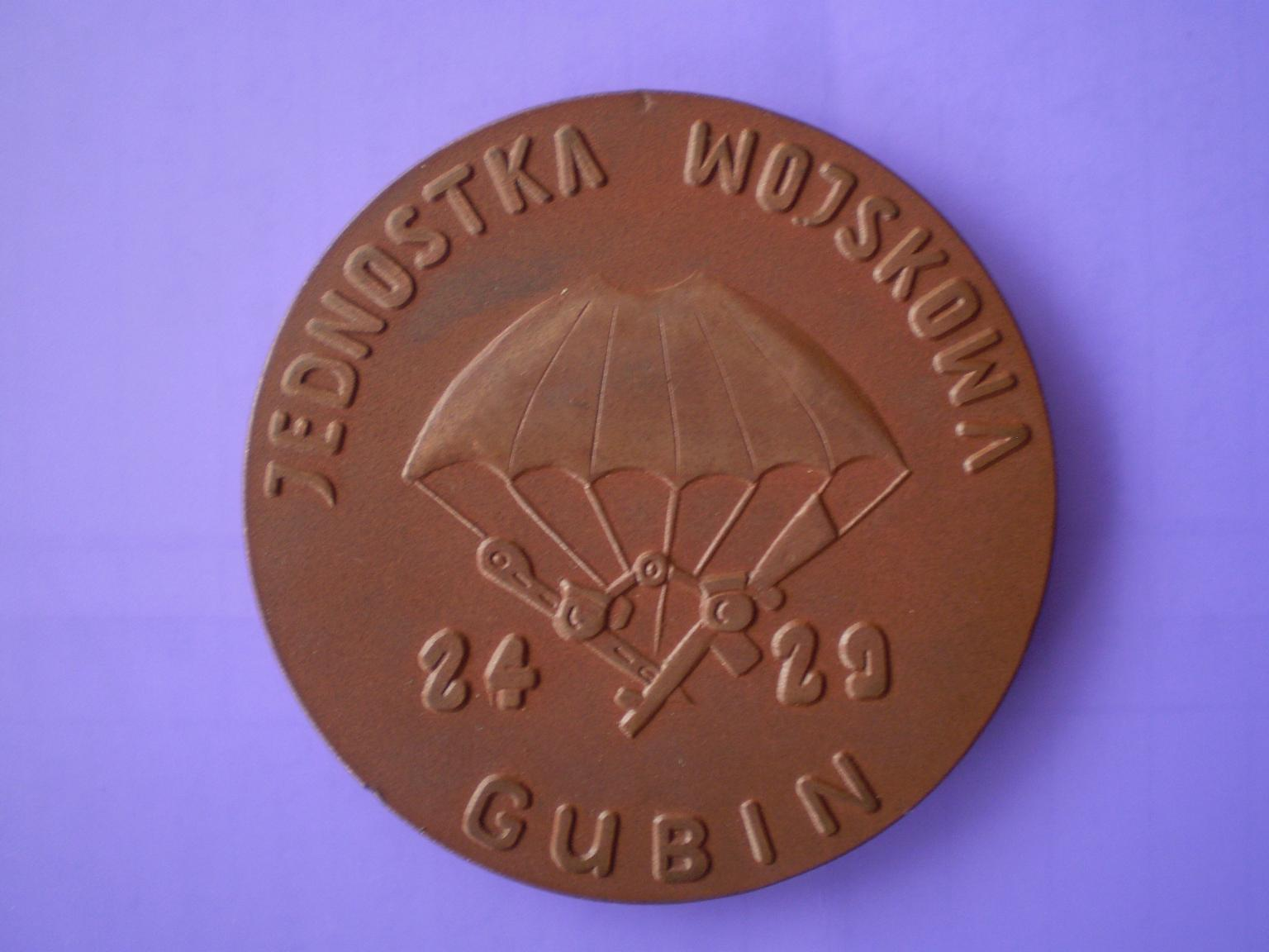 Medal pamiątkowy 2 br z Gubina